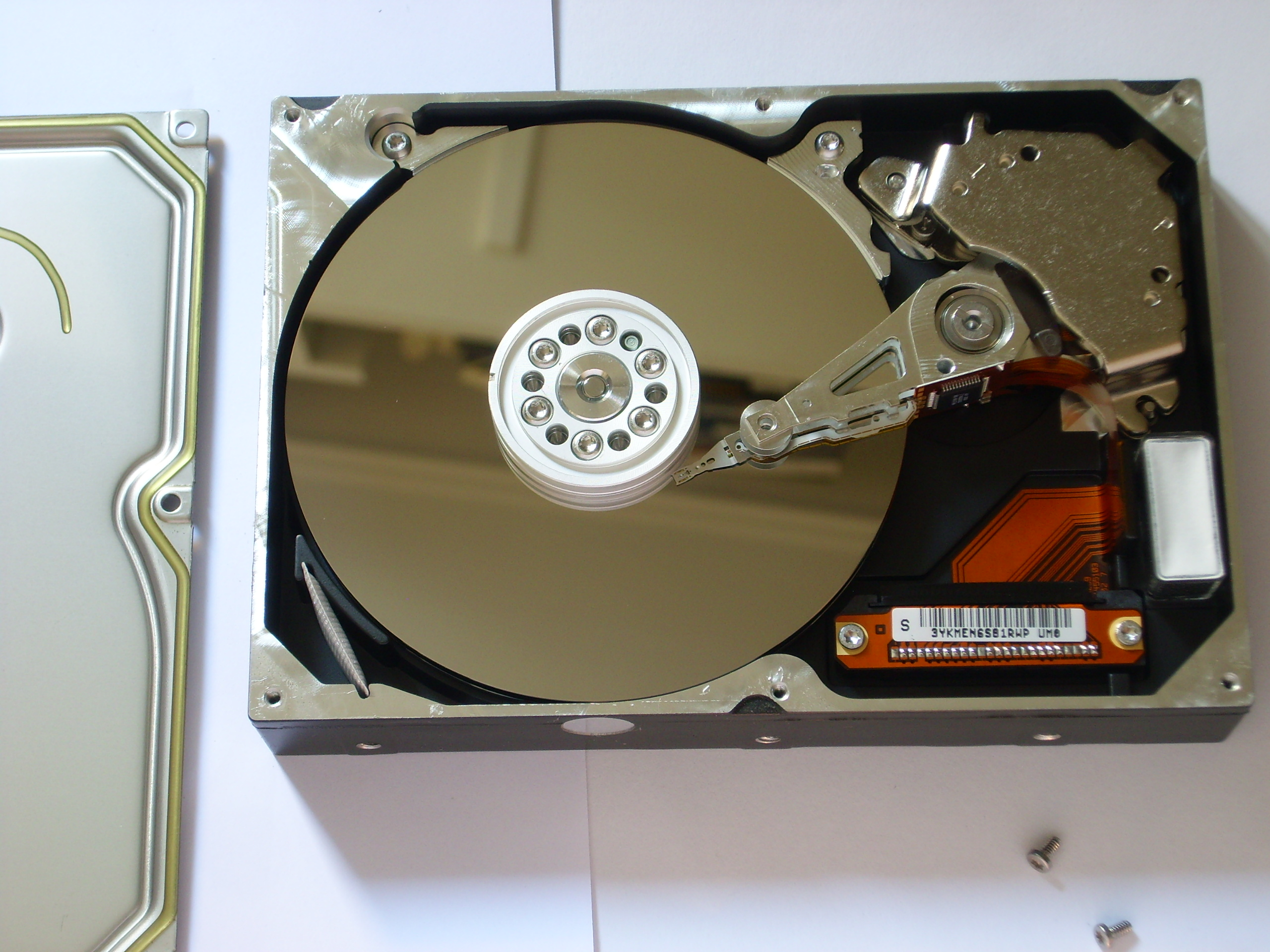 Apertura di un hard disk. Il disco aperto.